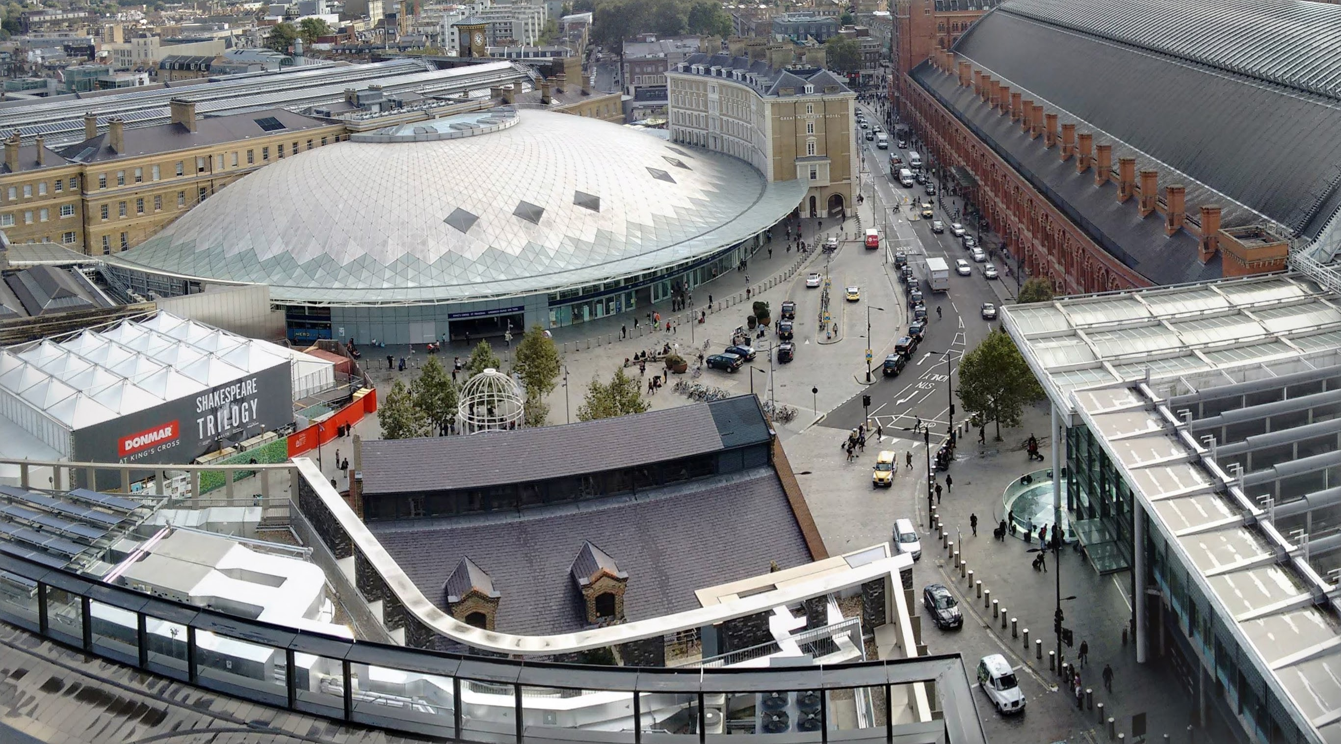 Imagen aérea de Londres, desde un edificio junto al intercambiador de transporte de King's Cross St. Pancras.